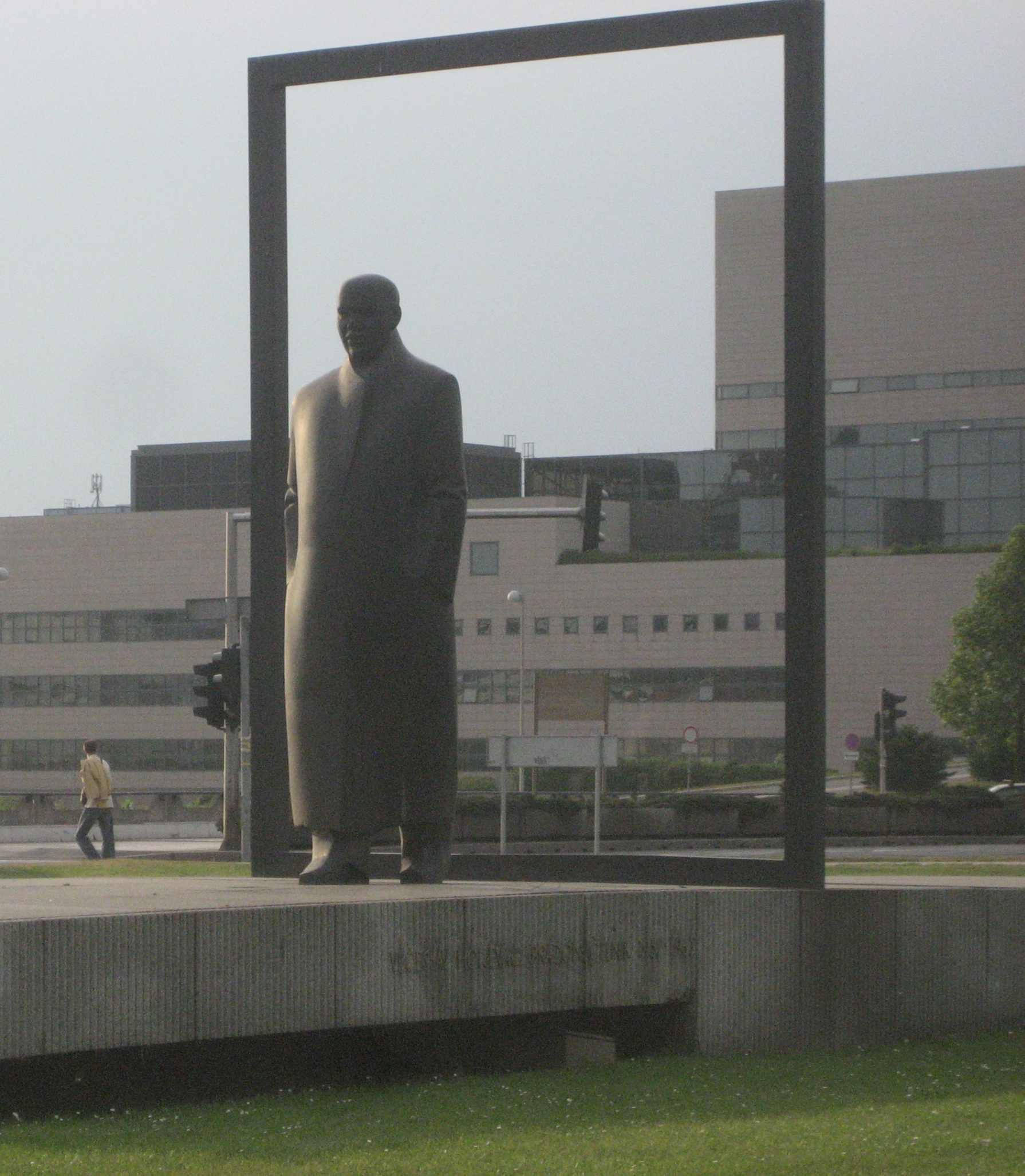 Većeslav Holjevac, Zagreb